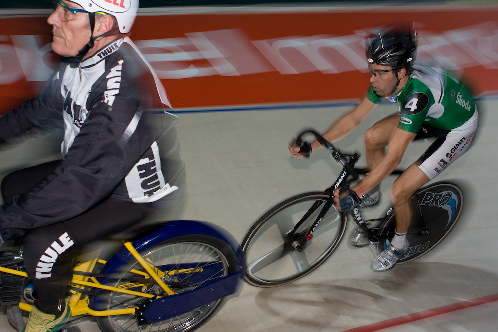 Danny Stam, Sixdays Zürich 2007-2008